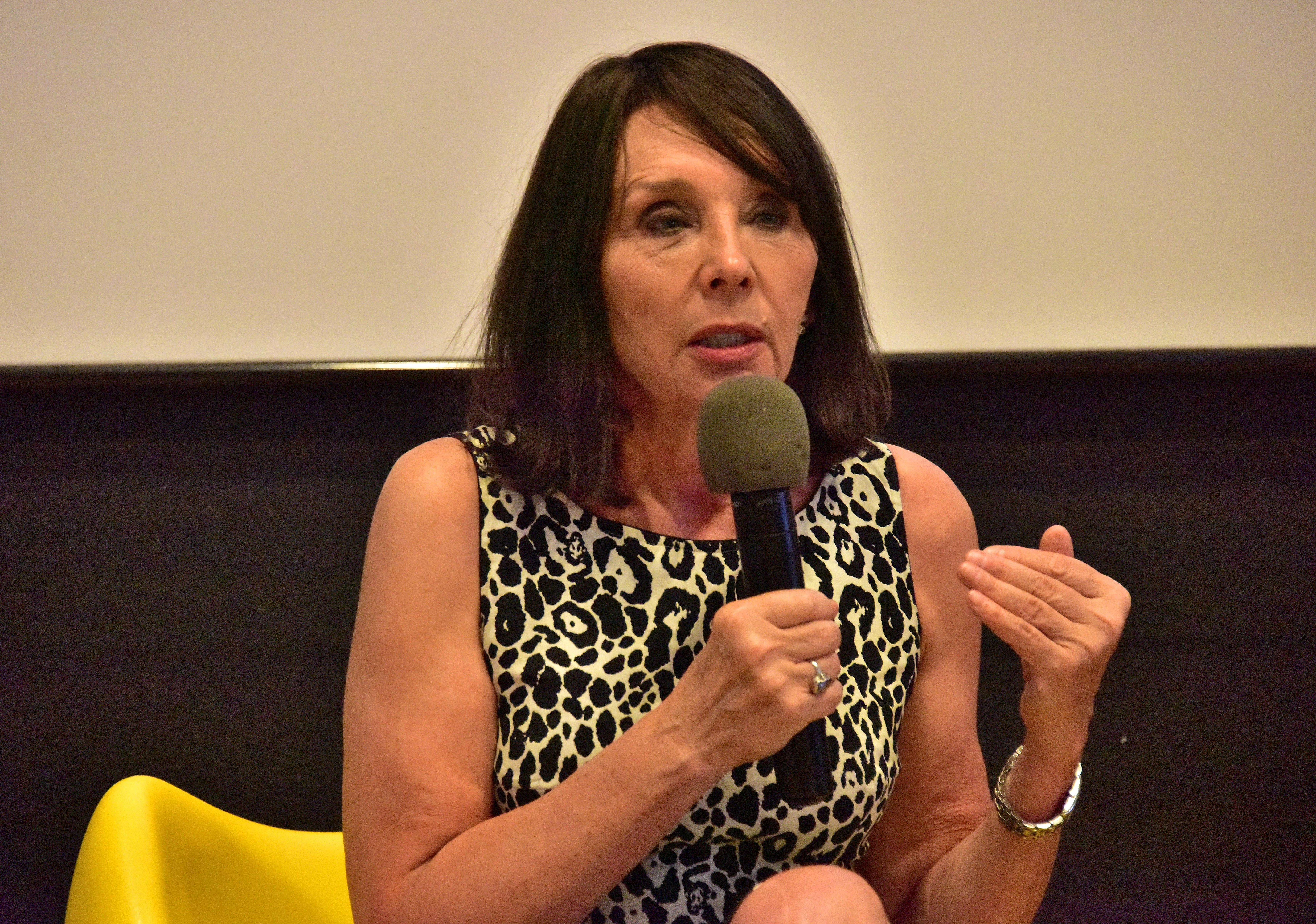 Ewa Ewart, polska dziennikarka, reżyser i producent filmowy